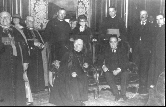 Hipólito Yrigoyen junto al Nuncio Apostolico y otros dignatarios de la Iglesia Católica en la casa de Doña Adela Harilaos de Olmos, propietaria de la actual sede la Nunciatura en la Avenida Alvear.